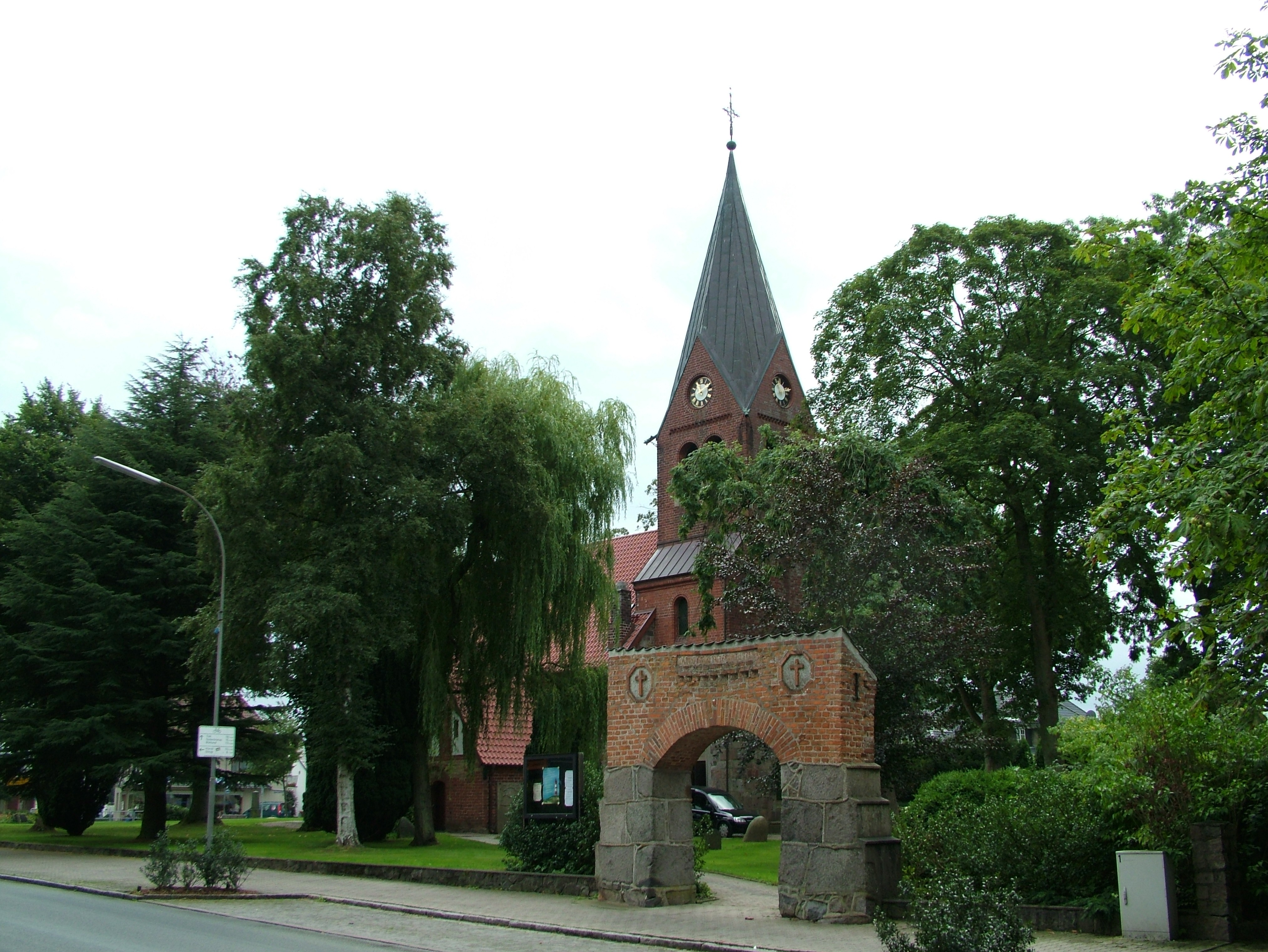 Satrup, Schleswig-Holstein, die Kirche